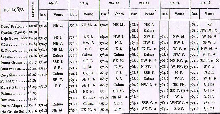 Tabela contendo dados meteorológicos do Império do Brasil - pressão e ventos entre os dias 8 e 13 de julho de 1887, elaborados pelo cientista Henrique Morize, do Imperial Observatório brasileiro, e publicada na revista para explicar a tempestade de 11/07/1887, que atingiu o sul do Brasil e afundou vários navios.